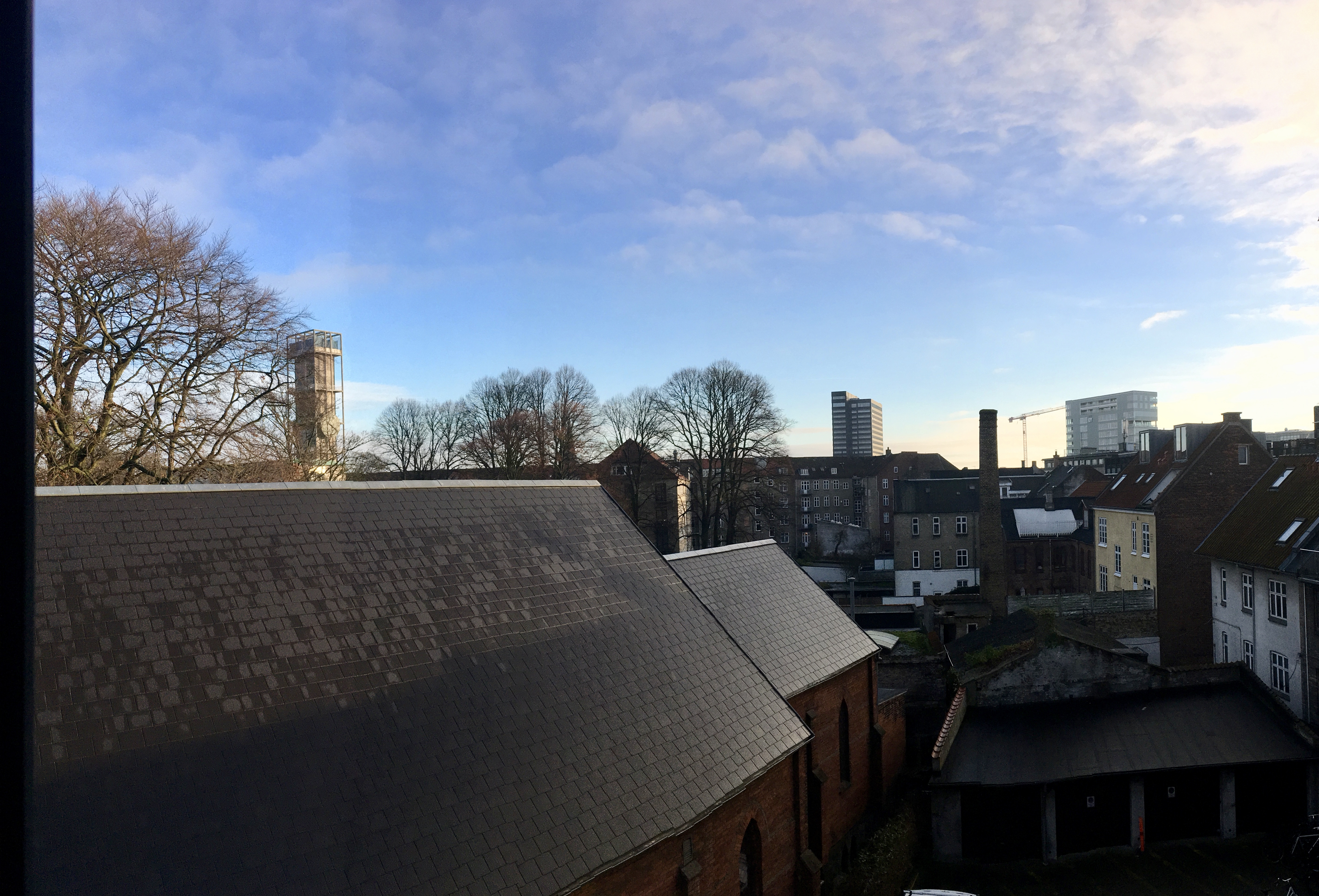 Udsigt over indre Aarhus